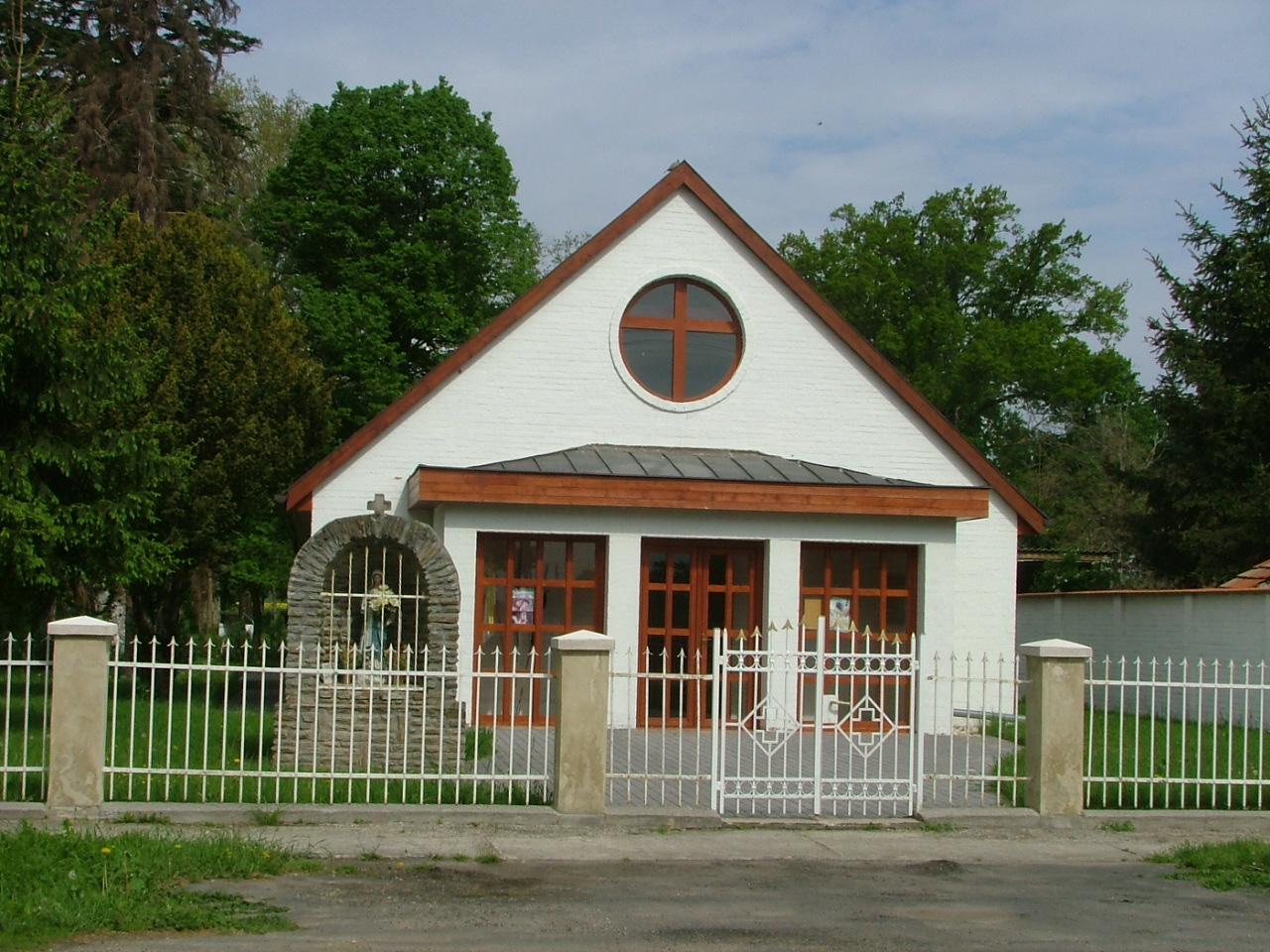 Kirche in Mesterháza